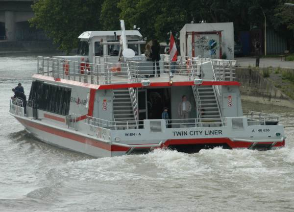 Schiff Twin City Liner im Donaukanal von Wien (Heckansicht)